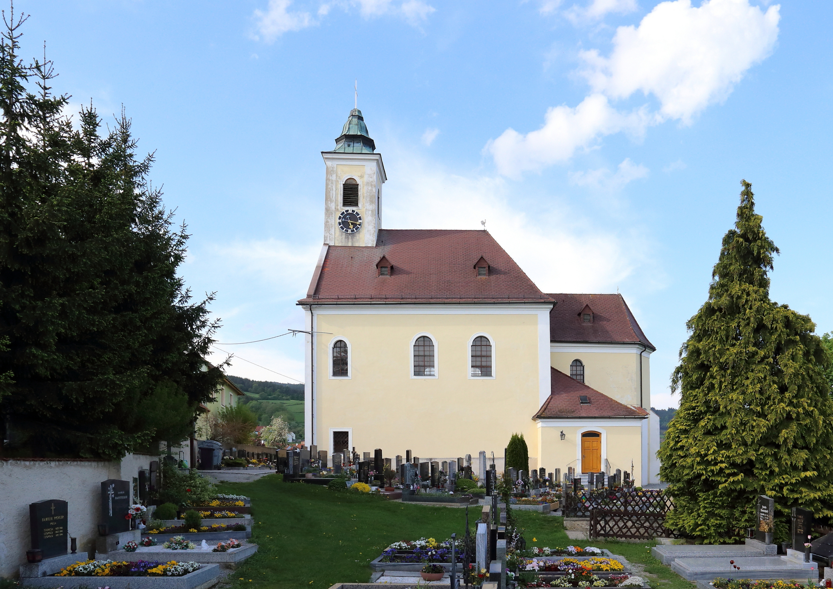 Katholische Pfarrkirche hl. Gotthard der niederösterreichischen Marktgemeinde Raxendorf.